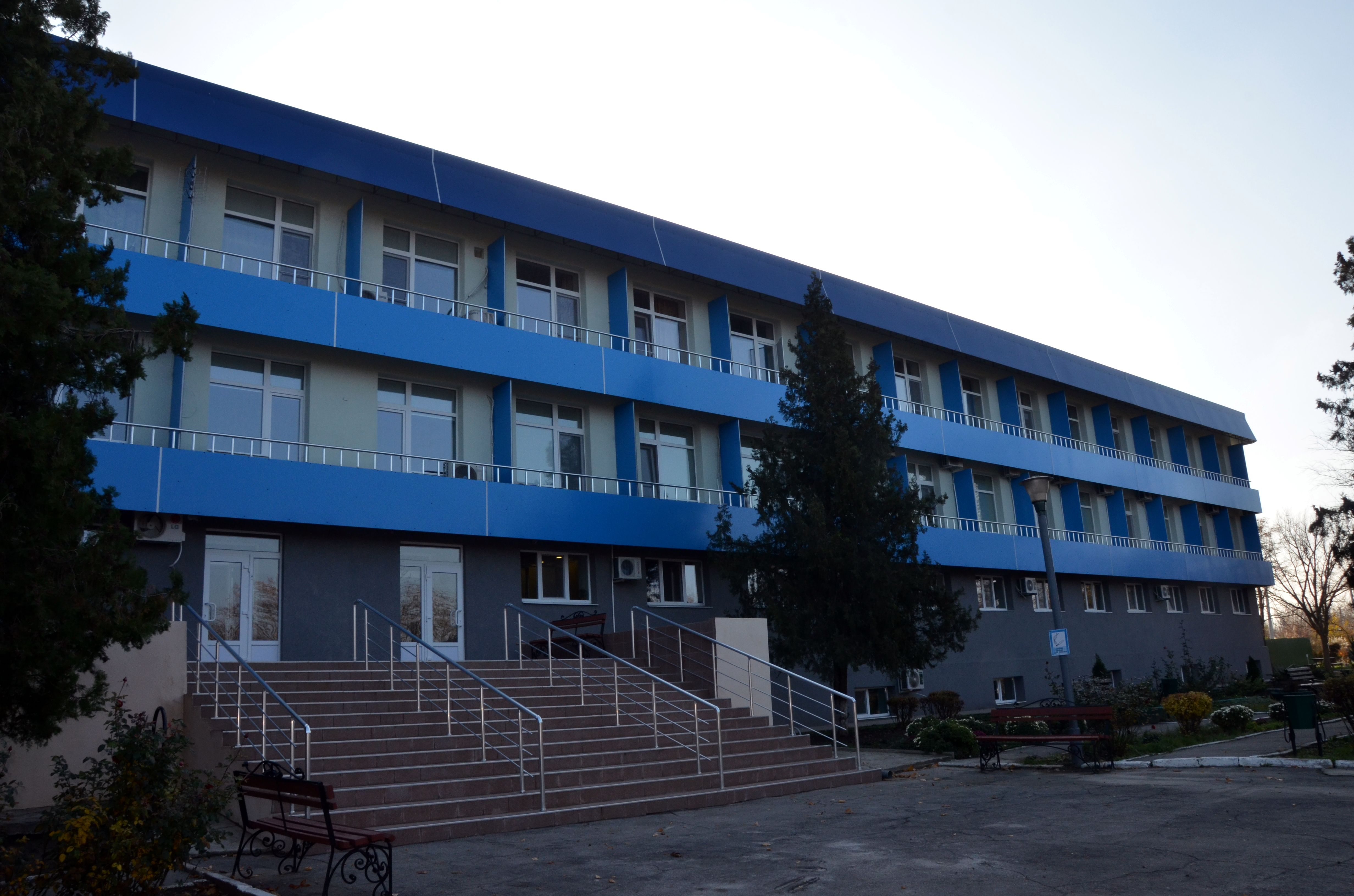 Санаторий-профилакторий Горняк